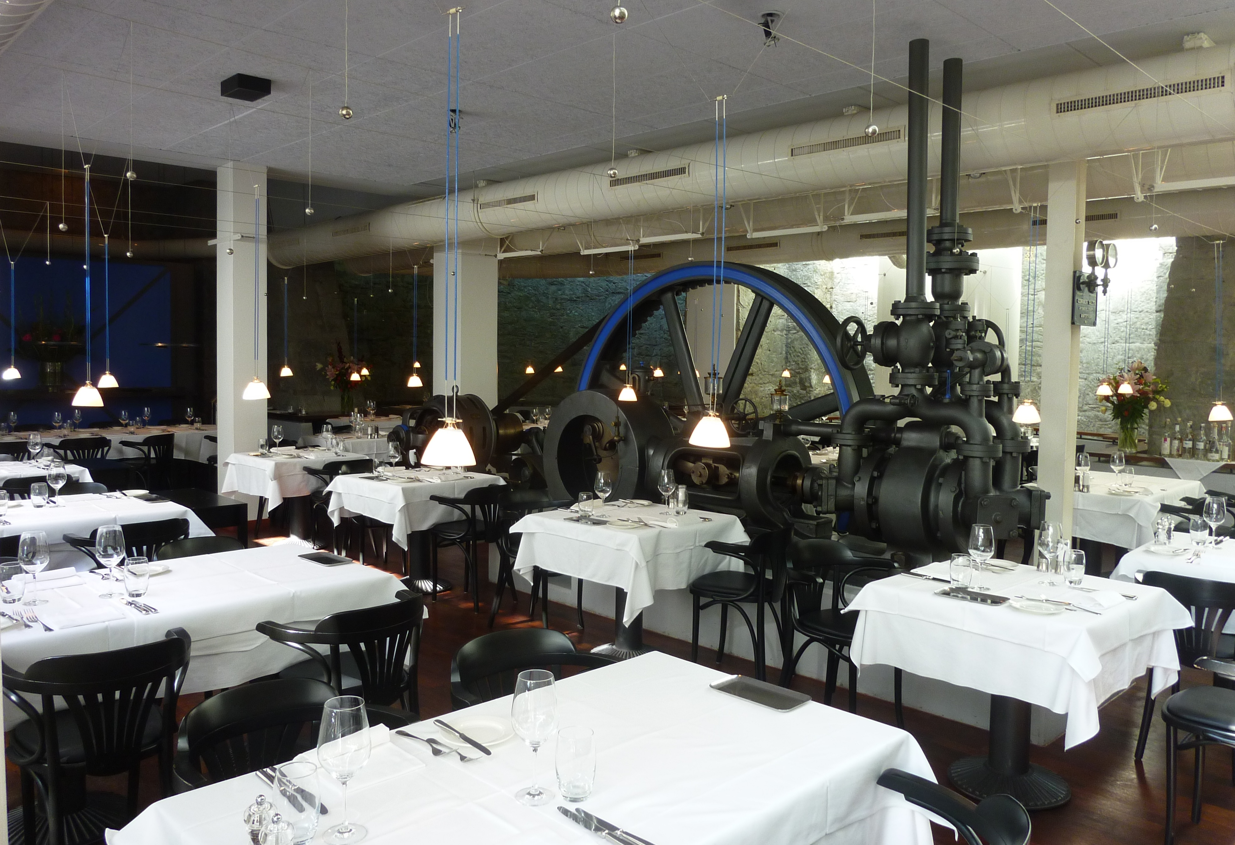 Restaurant Blaue Ente in Zürich